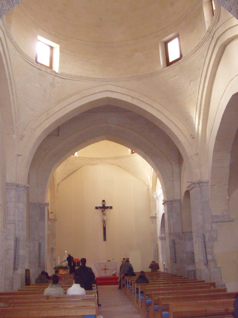 Navata centrale della Chiesa Madre di Cerignola (FG).